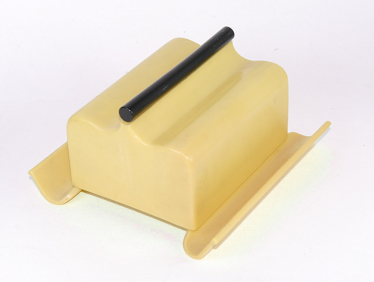 Pollopas-Butterdose, um 1935 (Sammlung Kay Meiners)